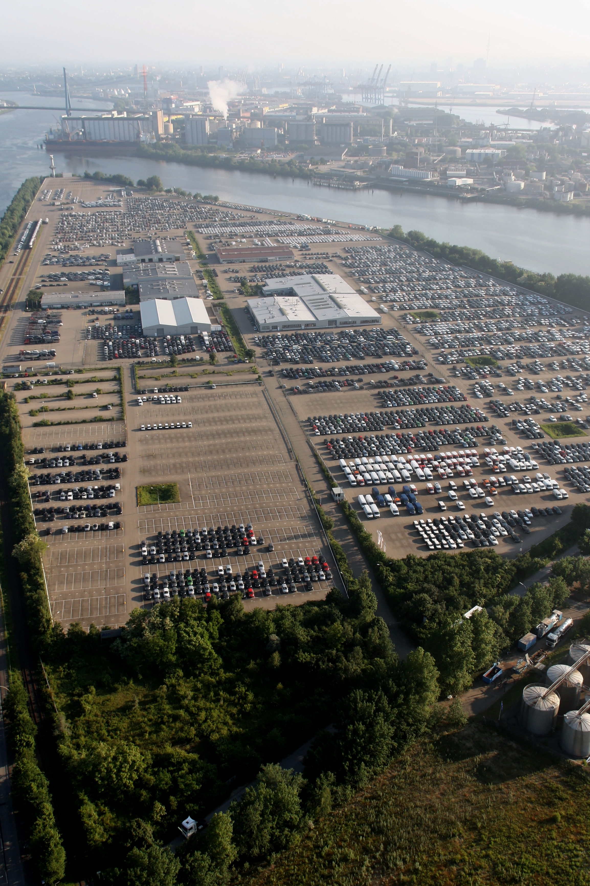 Hamburger Hafen, Autoterminal Rethe